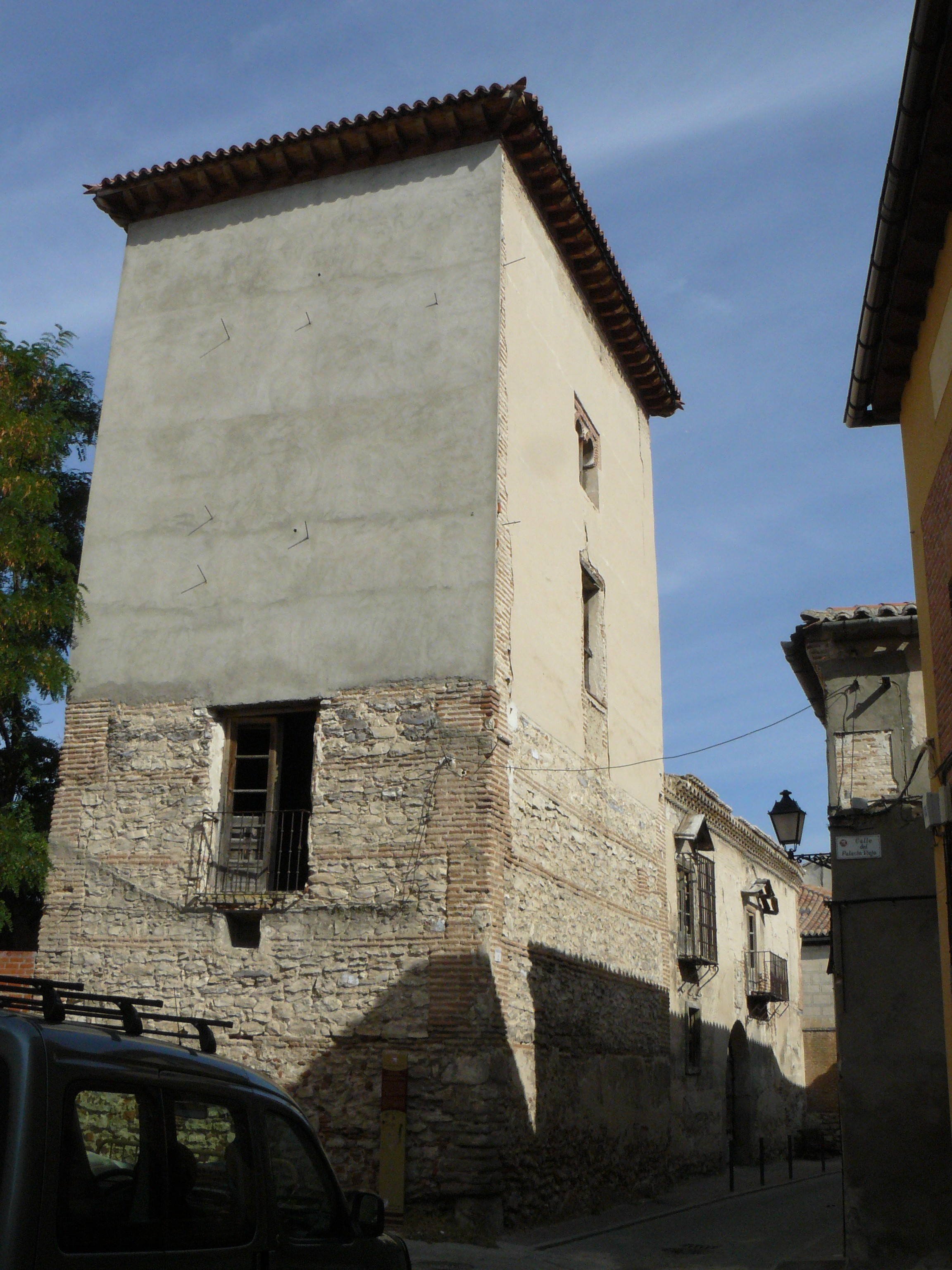 Palacio de los Sedeños, Arévalo, provincia de Ávila.